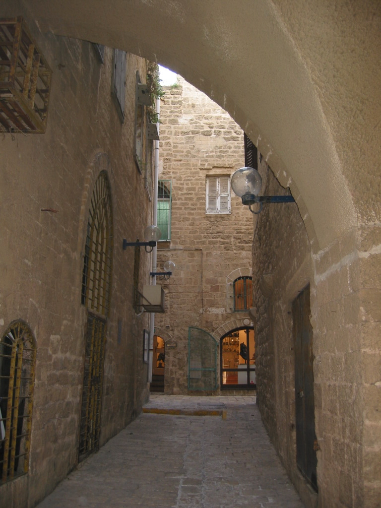 Old Jaffa (Yaffo)